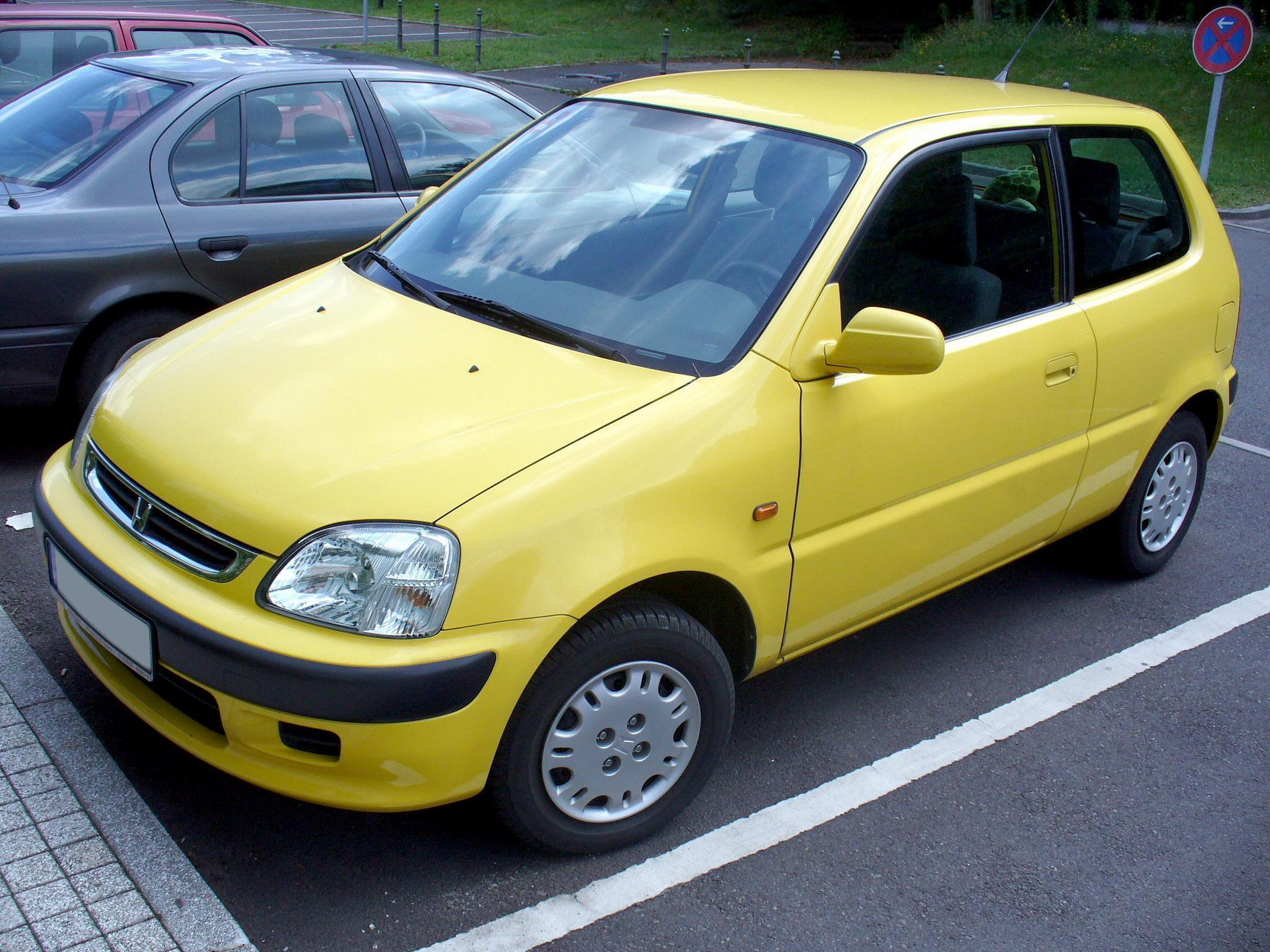 Honda Logo 3-doors